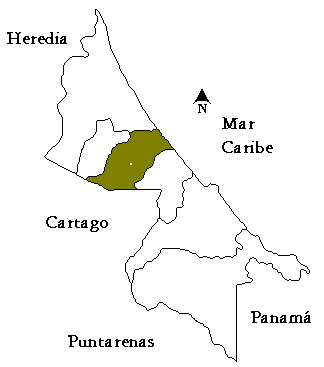 Mapa del cantón de Siquirres, provincia de Limón, Costa Rica